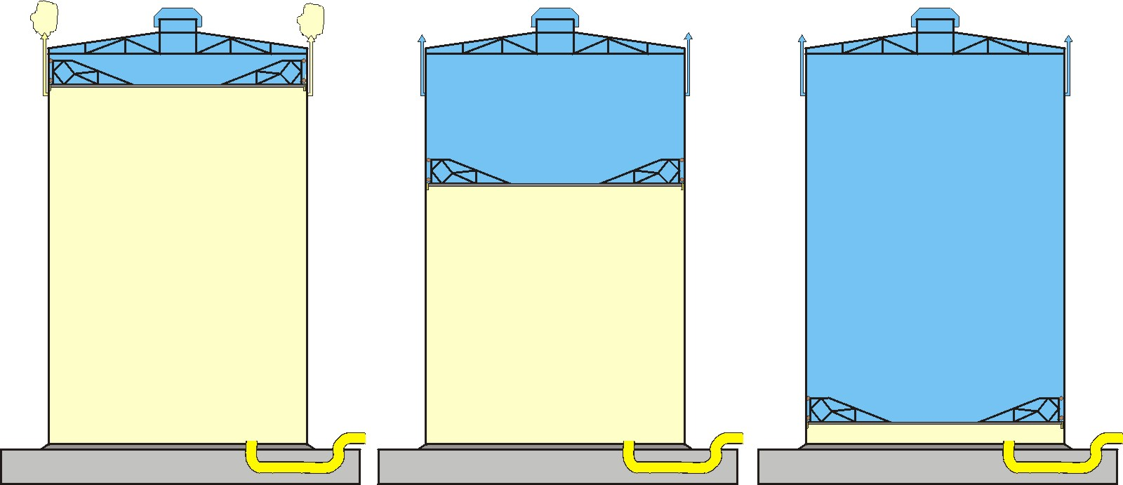 verschiedene Füllzustände von Scheibengasbehälter